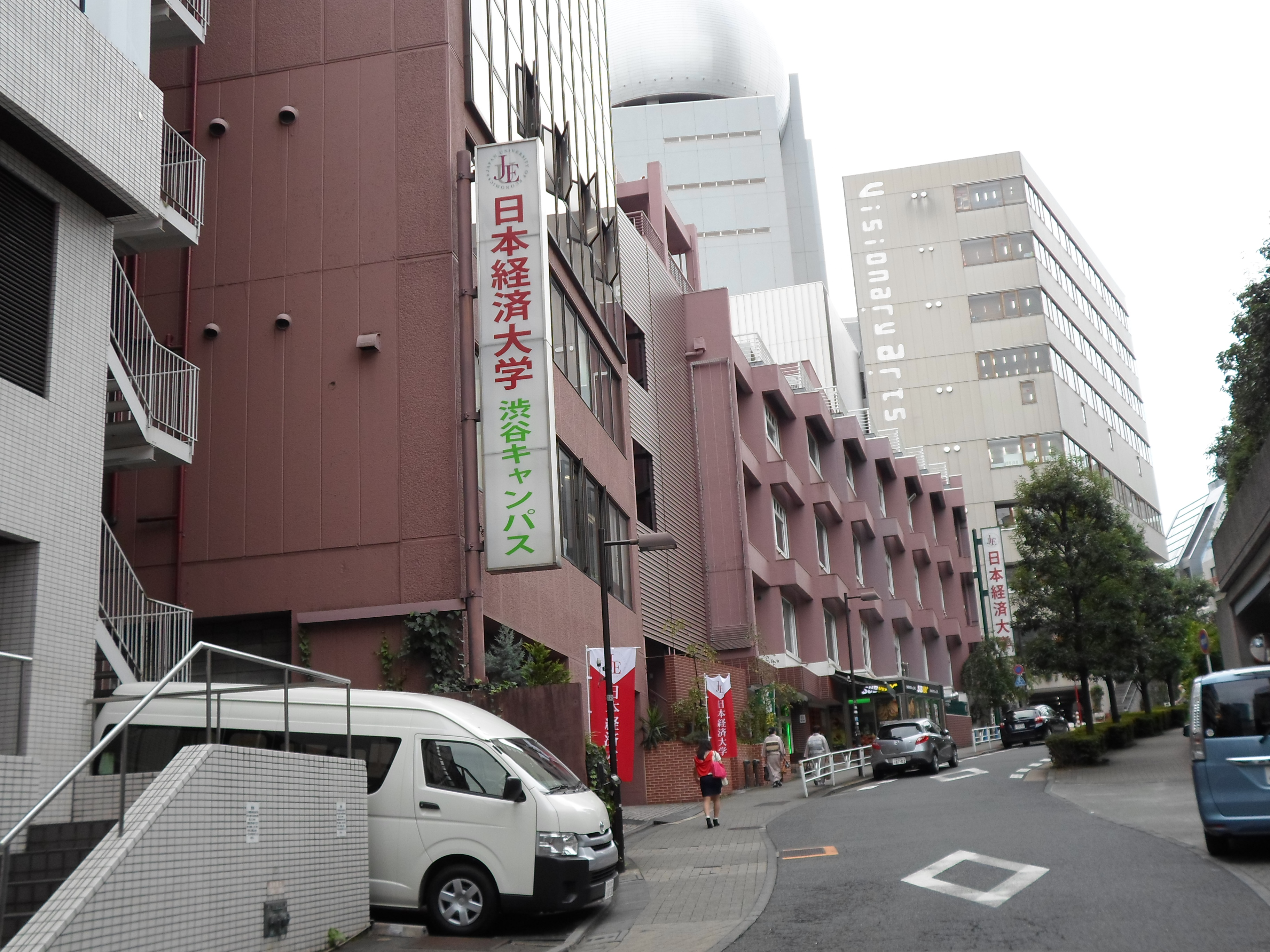 日本経済大学渋谷キャンパス。日本東京都渋谷。